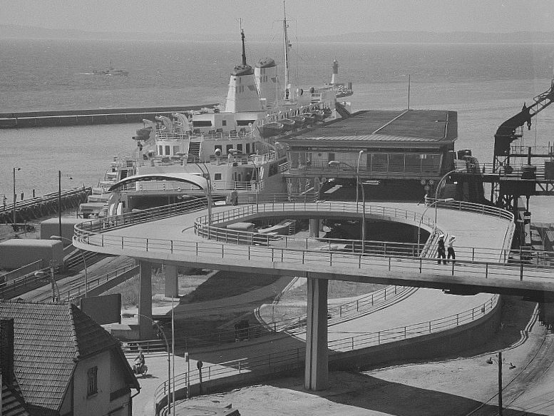 Original image description from the Deutsche Fotothek Saßnitz. Fährhafen, Hafenanlagen, das Fährschhiff Saßnitz im Fährbahnhof